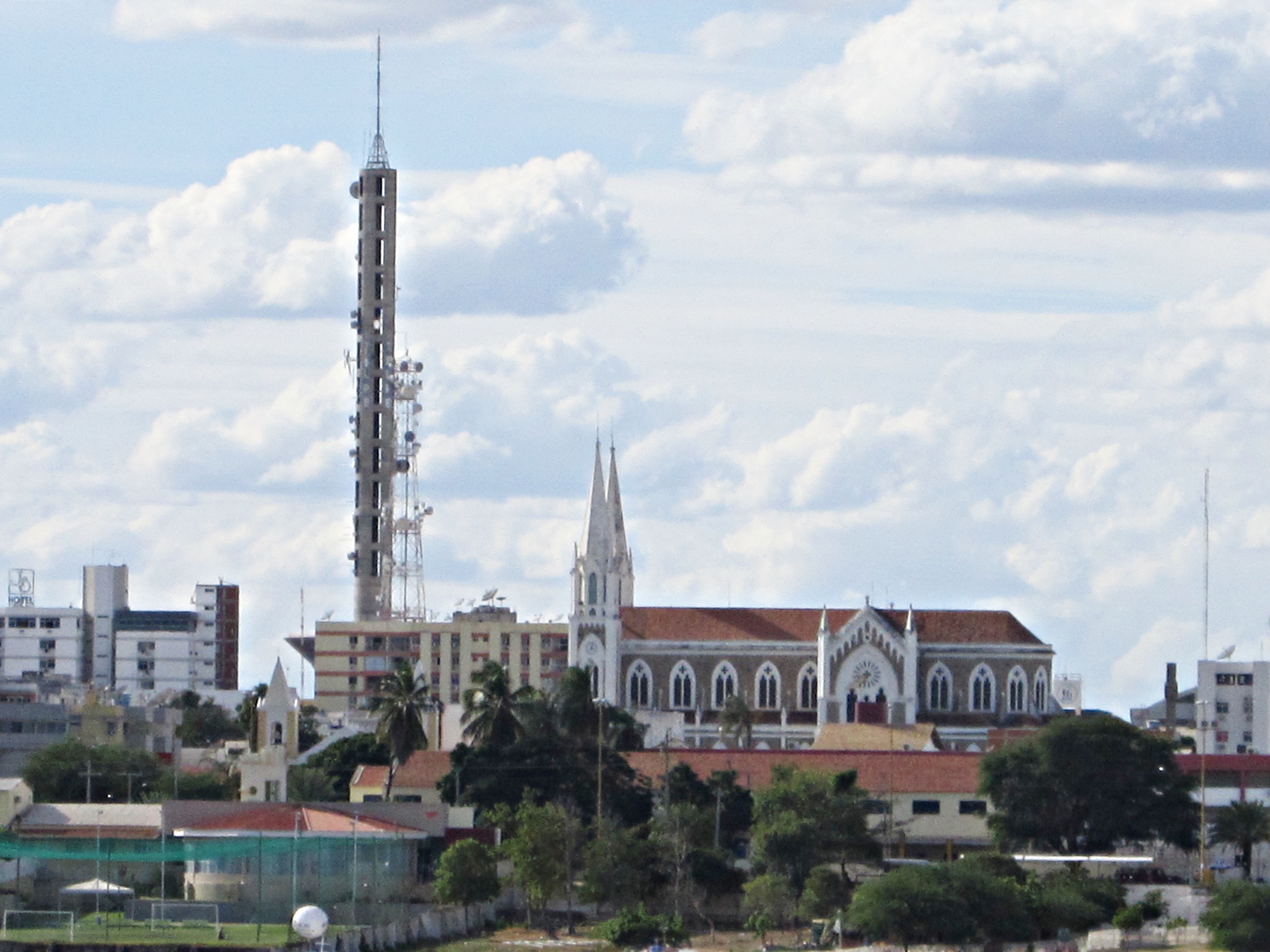 Catedral e Torre da Embratel - Petrolina, Pernambuco, Brasil